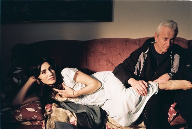 רונית אלקבץ ומוני מושונוב בסרטה של קרן ידעיה "כלת הים", 2009